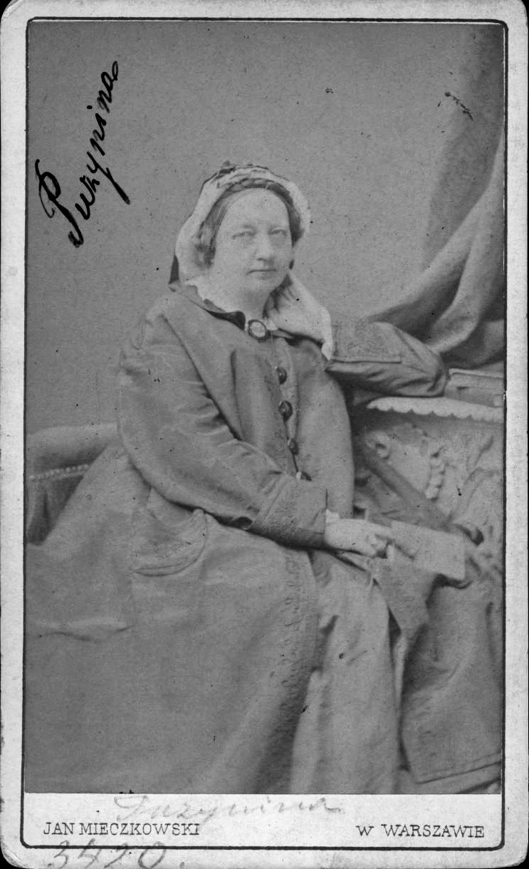 Gabriela Puzynina